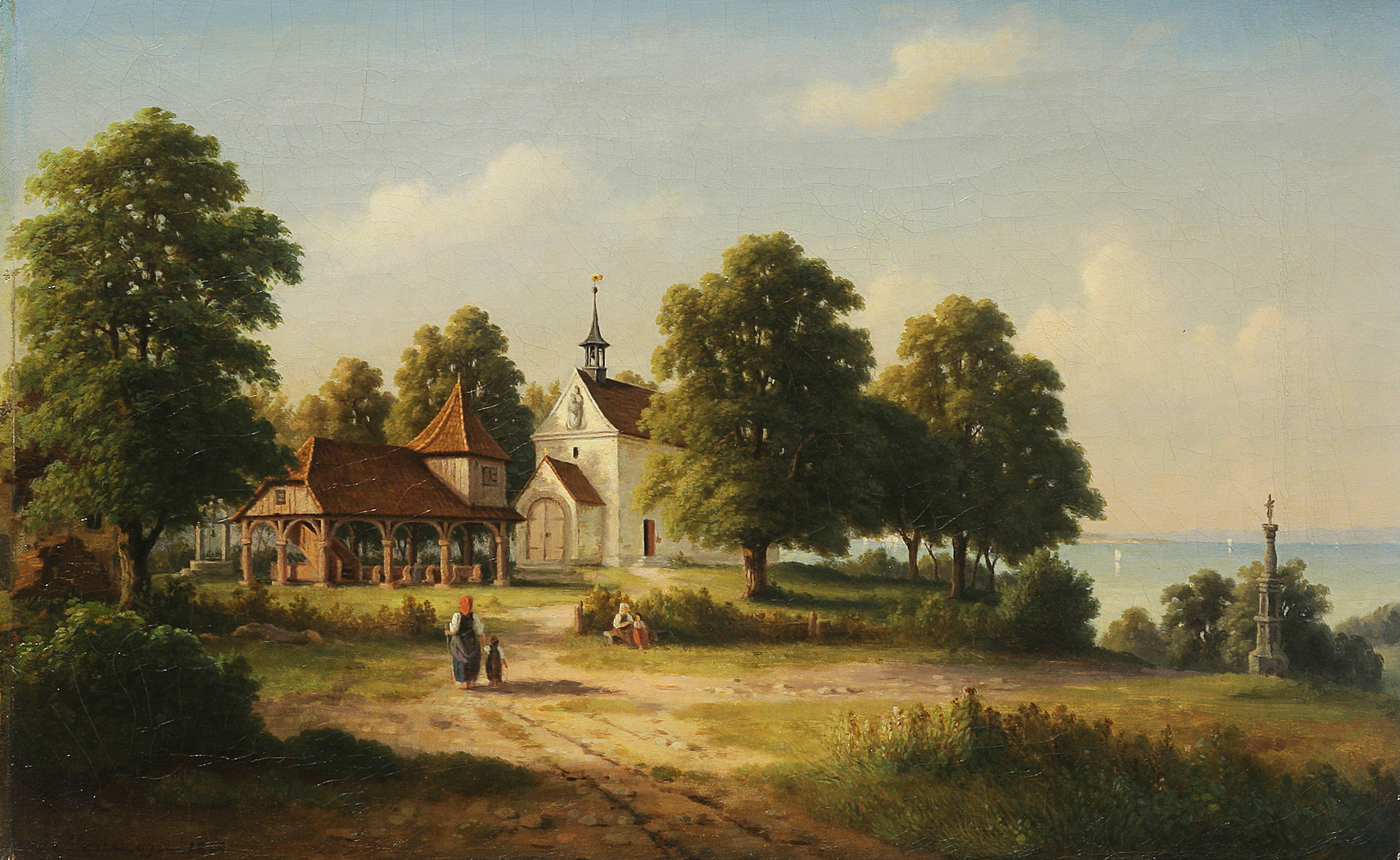 Joseph Mosbrugger: Lorettokapelle (Konstanz-Allmannsdorf); Öl auf Leinwand Bildmaß: 39,3 x 63 cm; Städtische Wessenberg-Galerie Konstanz Inv. Nr.: 87f/570